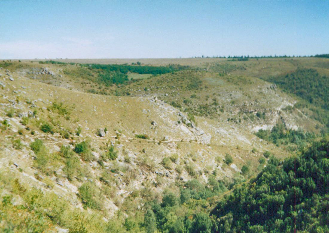 Gorge near Ţipova, Rezina County, Moldova.